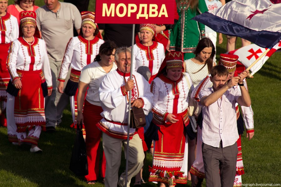 Представители мордовской диаспоры на Дне города Тольятти 2012